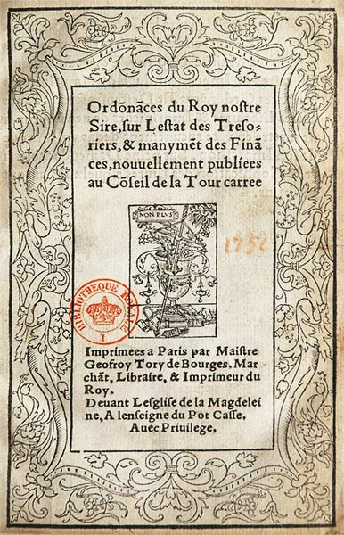 Achevé d'imprimer d'une ordonnance du roi